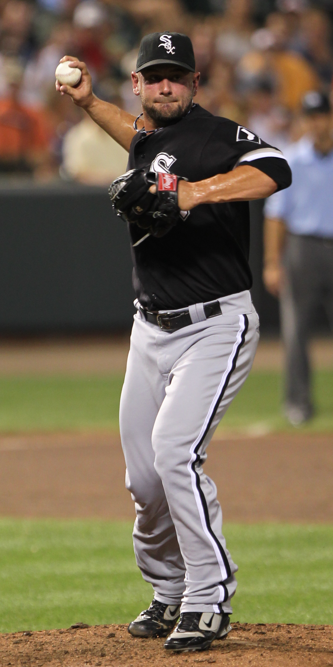 Jesse Crain